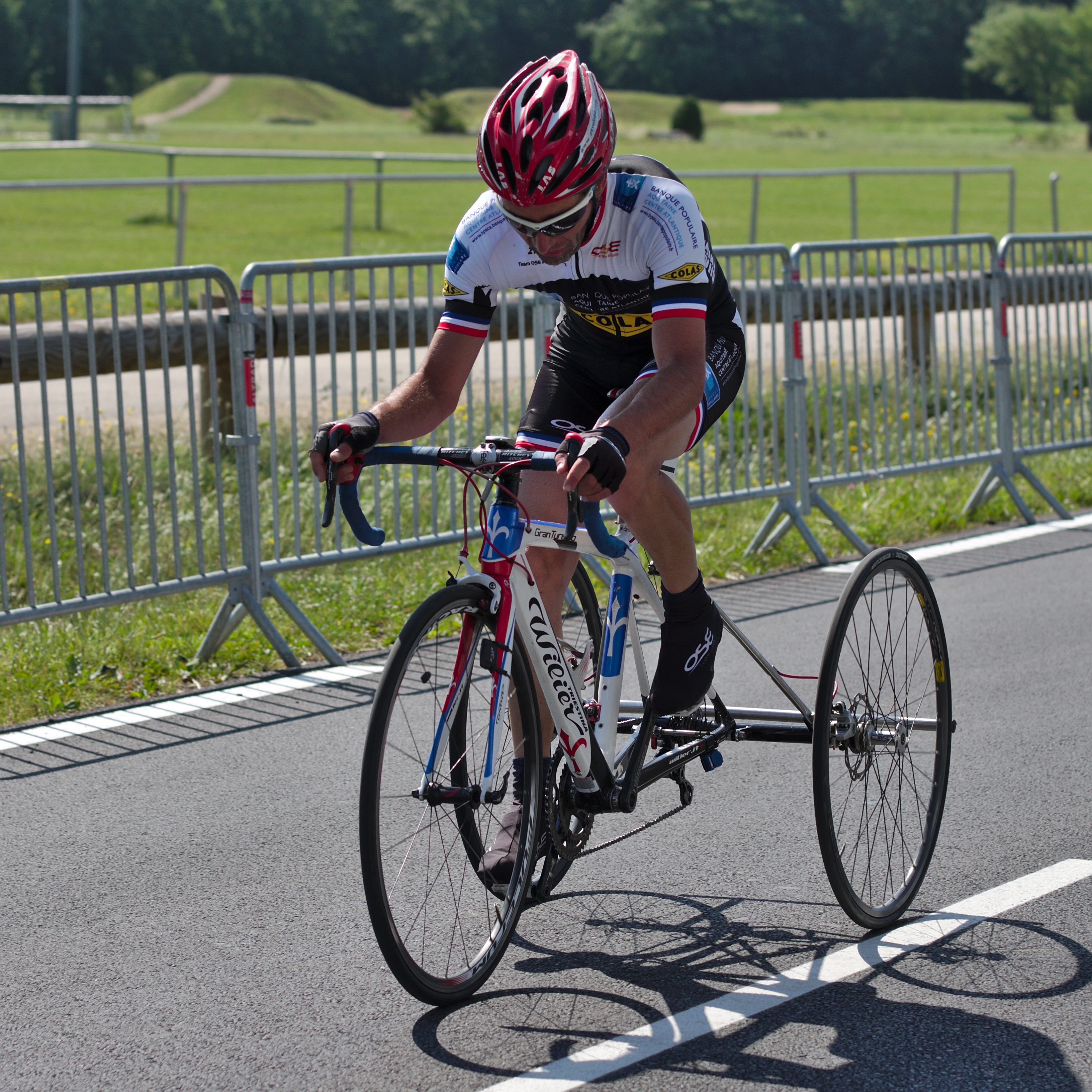 Championnat de France de cyclisme handisport - 20140615 - Contre la montre